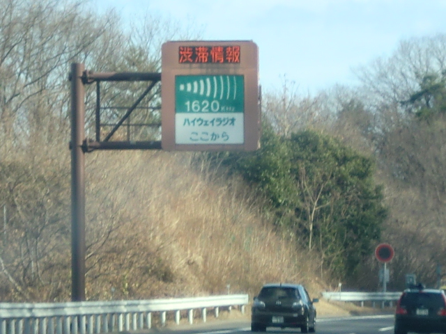 ハイウェイラジオここから（群馬県富岡市の上信越道で撮影）